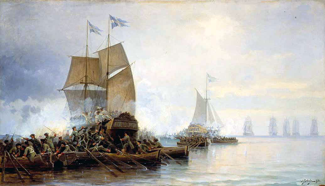 Взятие шведских кораблей в устье Невы. Блинов Леонид Демьянович, 1890 год, Художник Блинов Леонид Демьянович. Данное изображение было использовано в статье «Астрильд» опубликованной в третьем томе «Военной энциклопедии», который был издан книгоиздательским товариществом Ивана Дмитриевича Сытина в 1911 году в столице Российской империи городе Санкт-Петербурге.